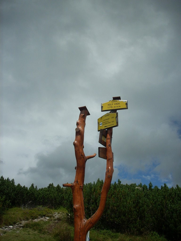 smerovník na Holom vrchu, západné Tatry, 1723 m.n.m.